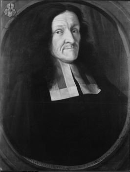 Bild in der Professorengalerie Tübingen